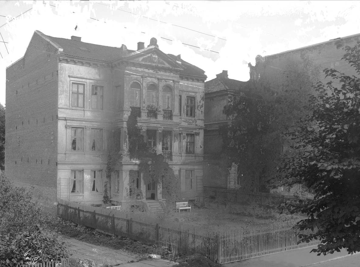 Industrigata 36 rundt 1920. Huset er siden revet. Foto: Anders Beer Wilse, fra Byhistorisk samling hos Oslo Museum.